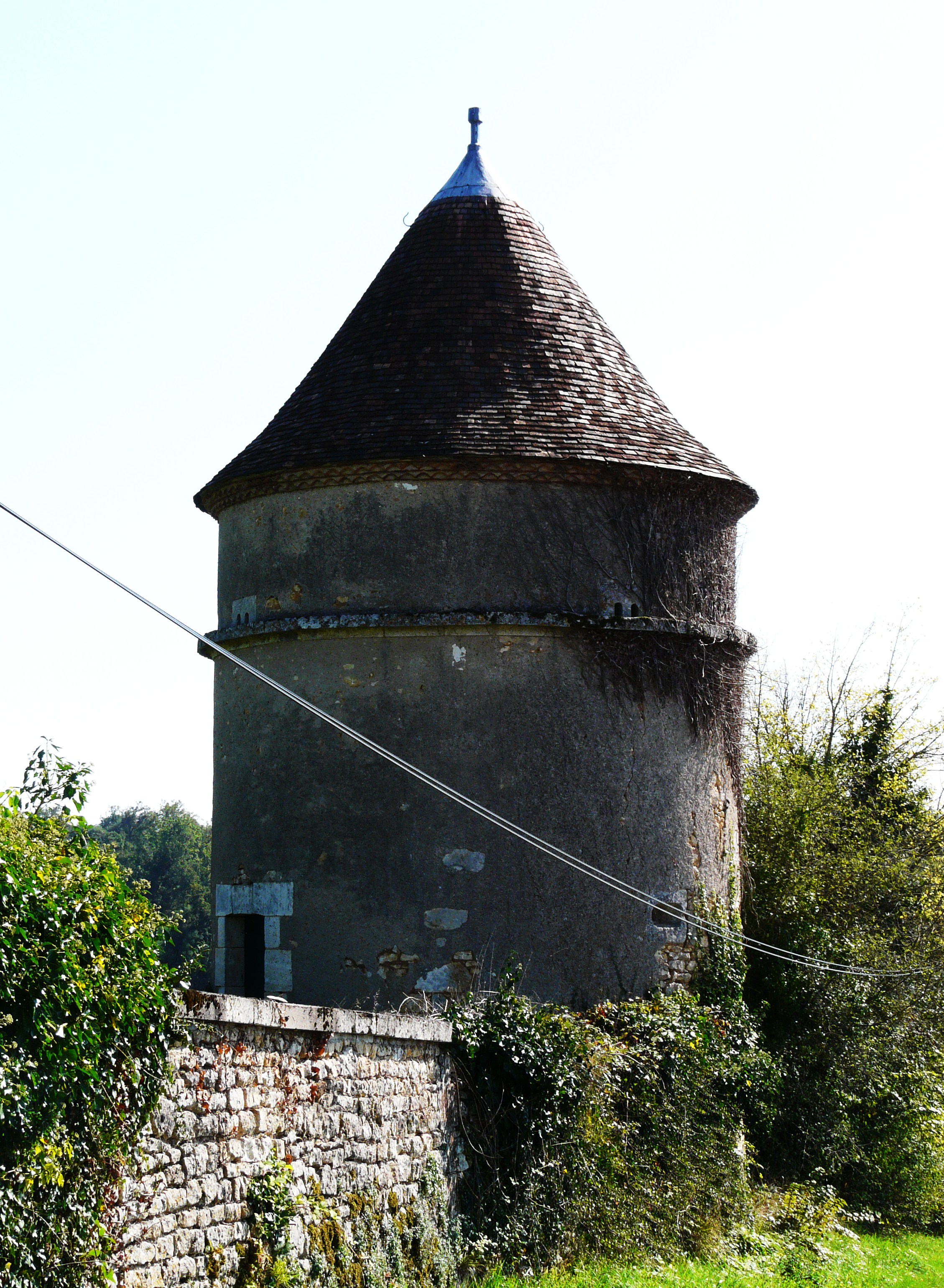 Pigeonnier du château de Beauvais, Lussas-et-Nontronneau, Dordogne, France